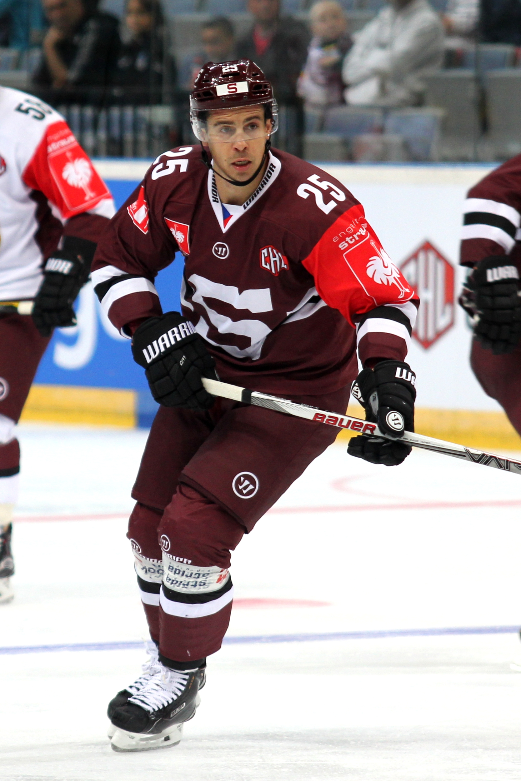 Michal Dragoun (P 25).